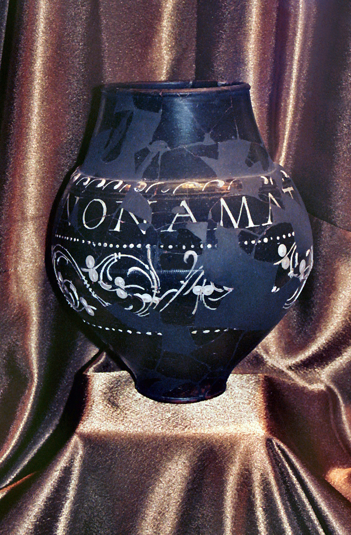 Villa Rustica Szentendre-Skanzen, Ungarn: Um 270 nach Pannonien importiertes Trierer Weinmischgefäß, das fast vier Liter faßte. Mit dazu passenden Trierer Trinkspruchbechern kam es um 290 in der nördlichen Ecke des Atriums der Villa in den Boden. Aufgenommen während der provinzialrömischen Sonderausstellung „Visegrád évszázadai – A római kor kezdete a Dunakanyarban“ die vom 19.08.2011 bis 20.07.2012 im Mátyás Király Múzeum (König-Matthias-Museum), Visegrád, stattfand.